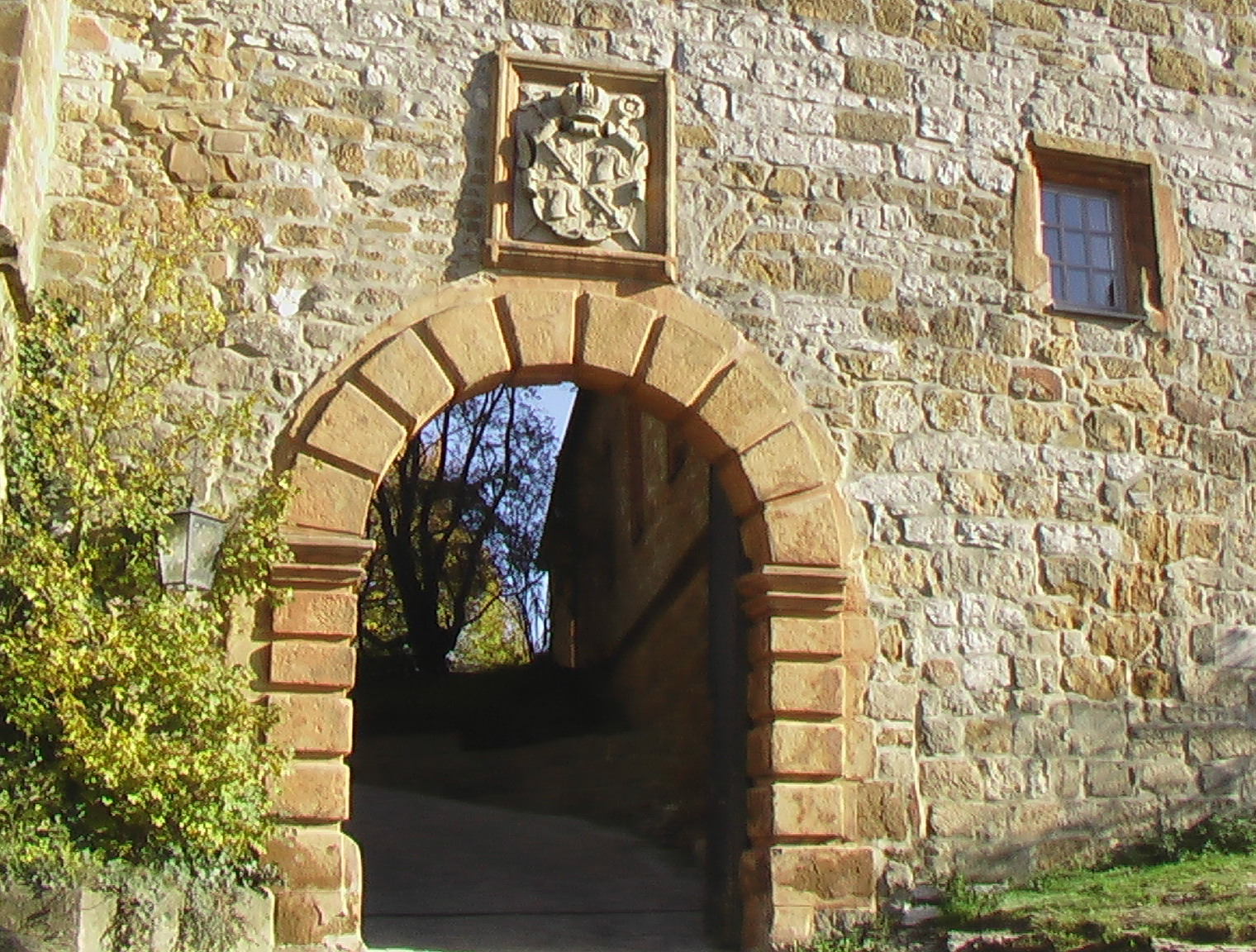 Giechburg